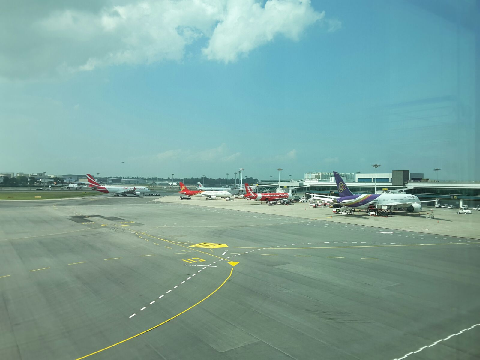 Lapangan Terbang Antarabangsa Changi